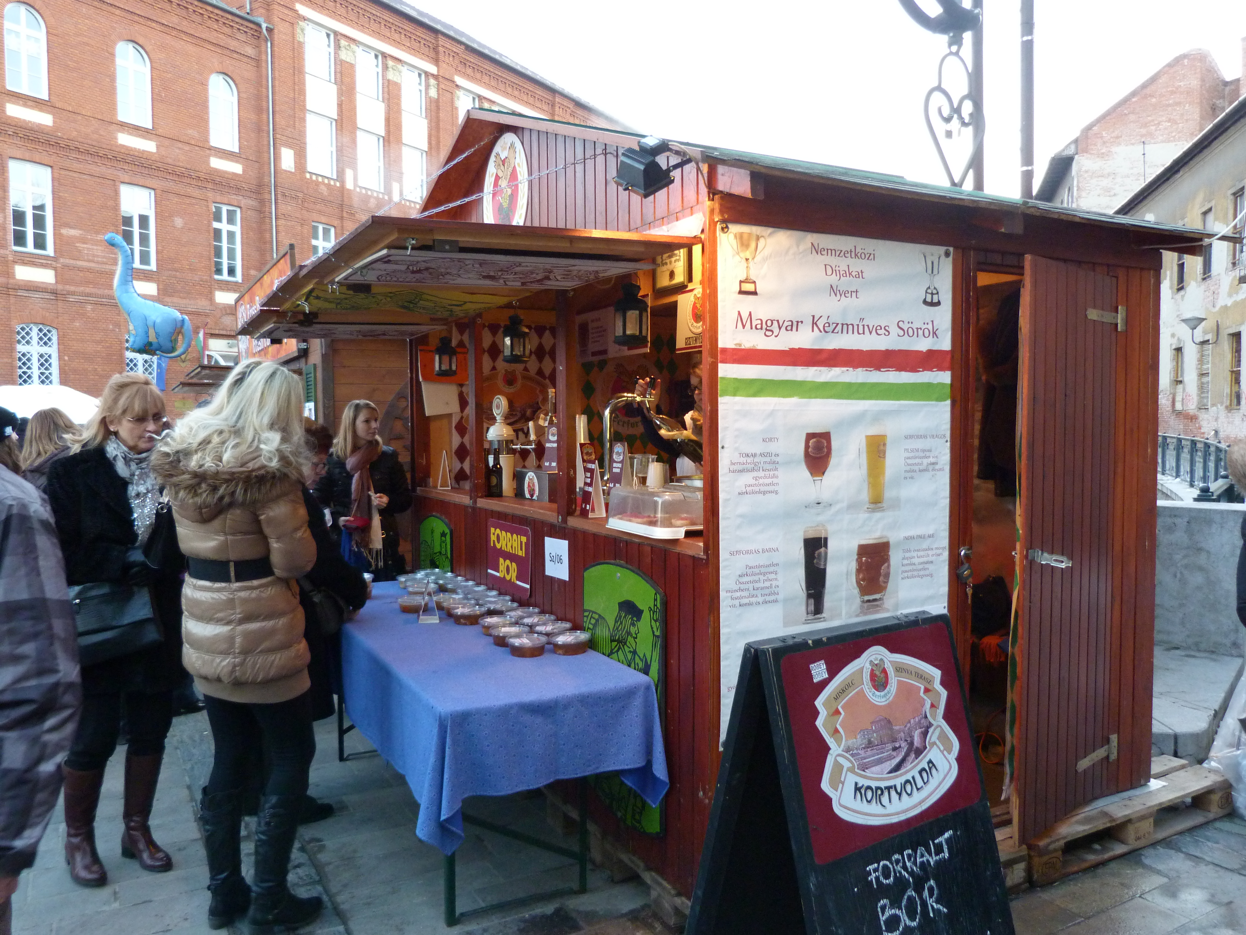 A felvétel 2015. február 7-én szombaton készült Miskolcon. Miskolci Kocsonyafesztivál. ©© Derzsi Elekes Andor, Budapest, 2015, Published in the Metapolisz DVD line. You are authorised to use this vid under Creative Commons – even for commercial, for profit purposes. The vid must be attributed to Derzsi Elekes Andor. All of the photos and vids in the Metapolisz DVD line are under Creative Commons and can be used even for commercial – for profit – purposes. Recommended Citation Derzsi Elekes Andor: Metapolisz DVD line